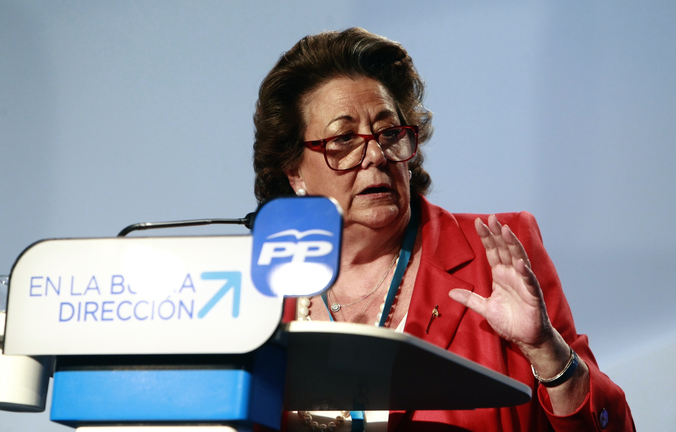 21 Intermunicipal del PP en Valencia